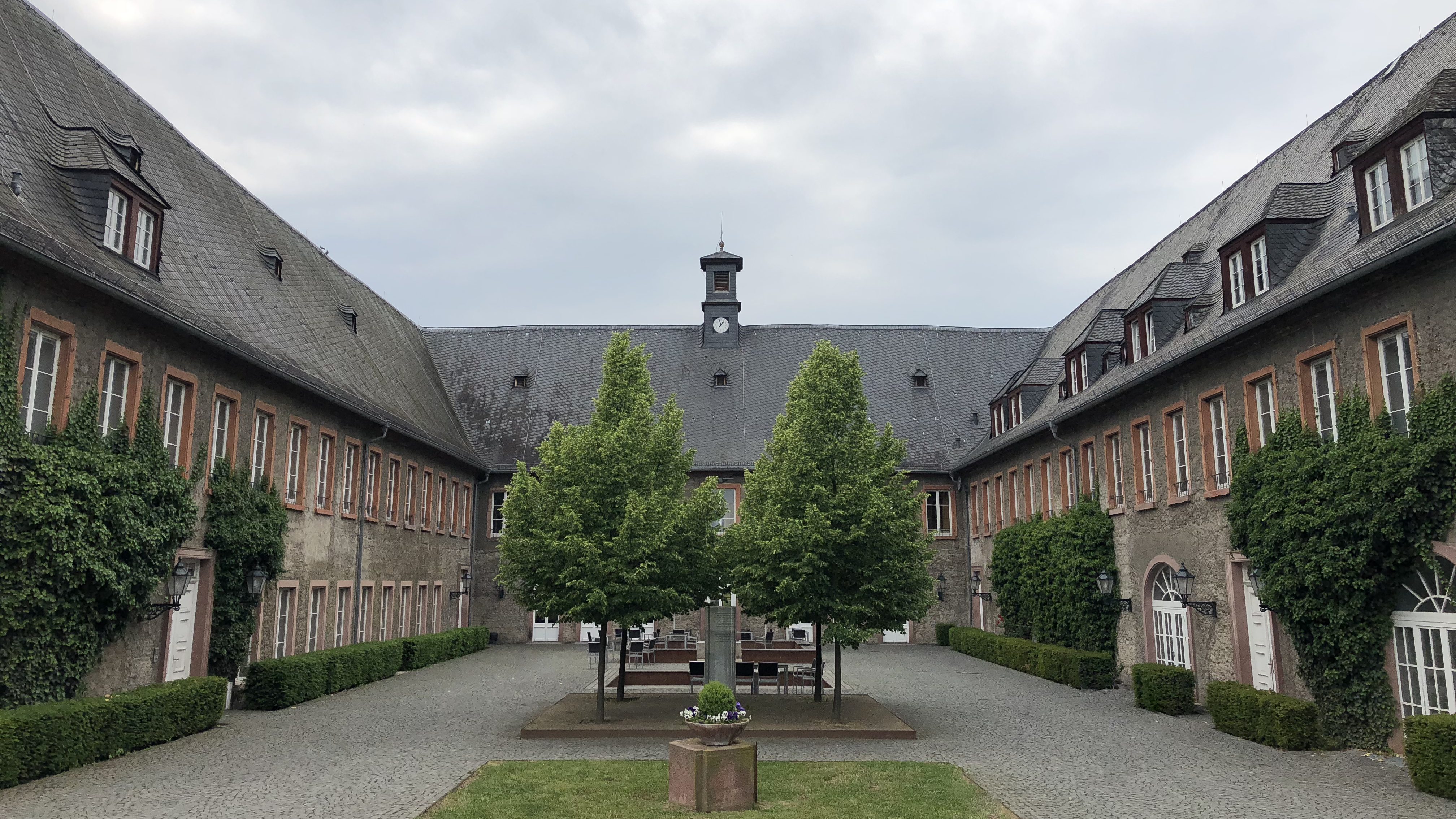 Innenhof Schloss Reichartshausen